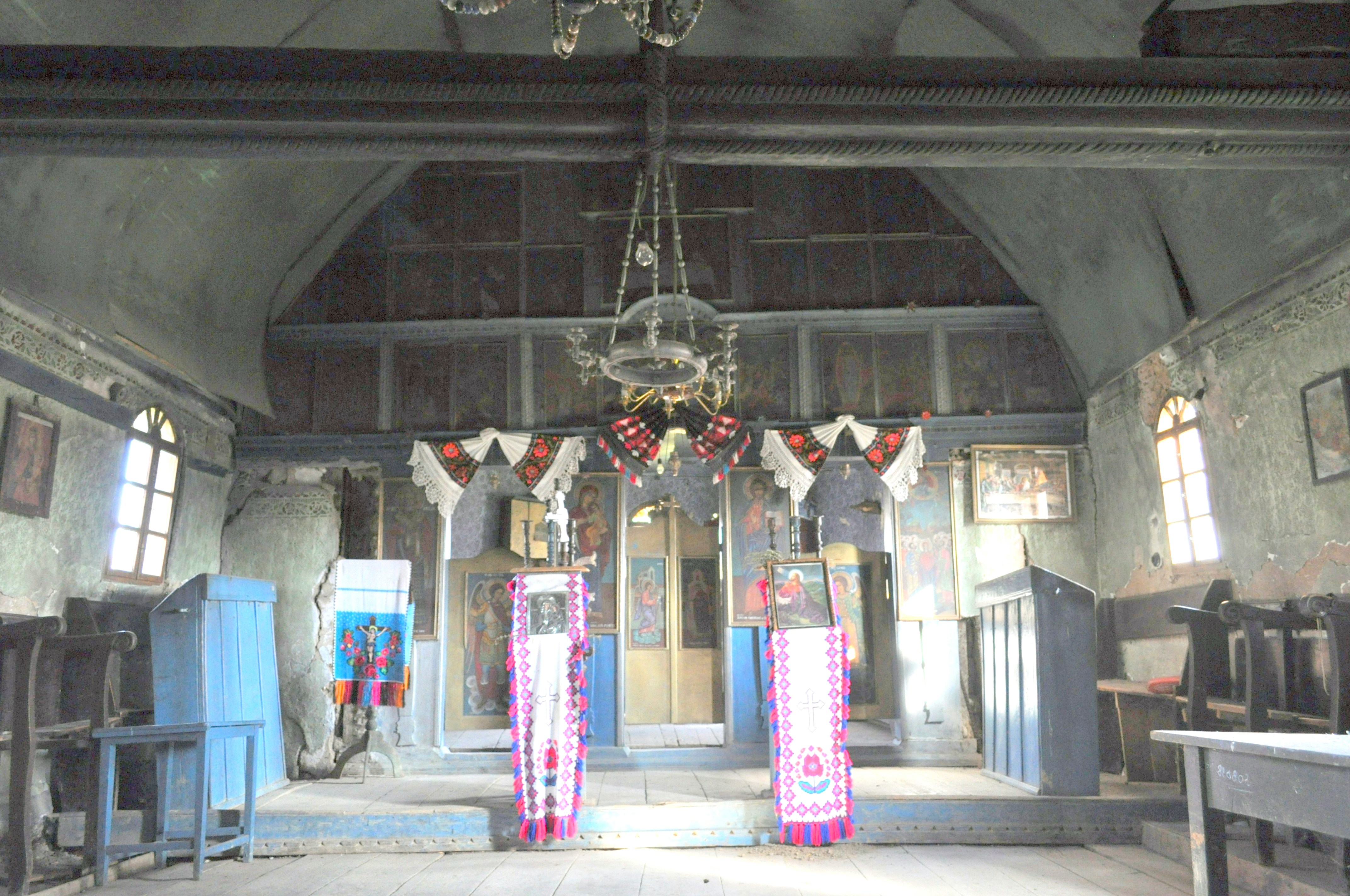 Biserica de lemn „Nașterea Maicii Domnului” din Săucani, județul Bihor